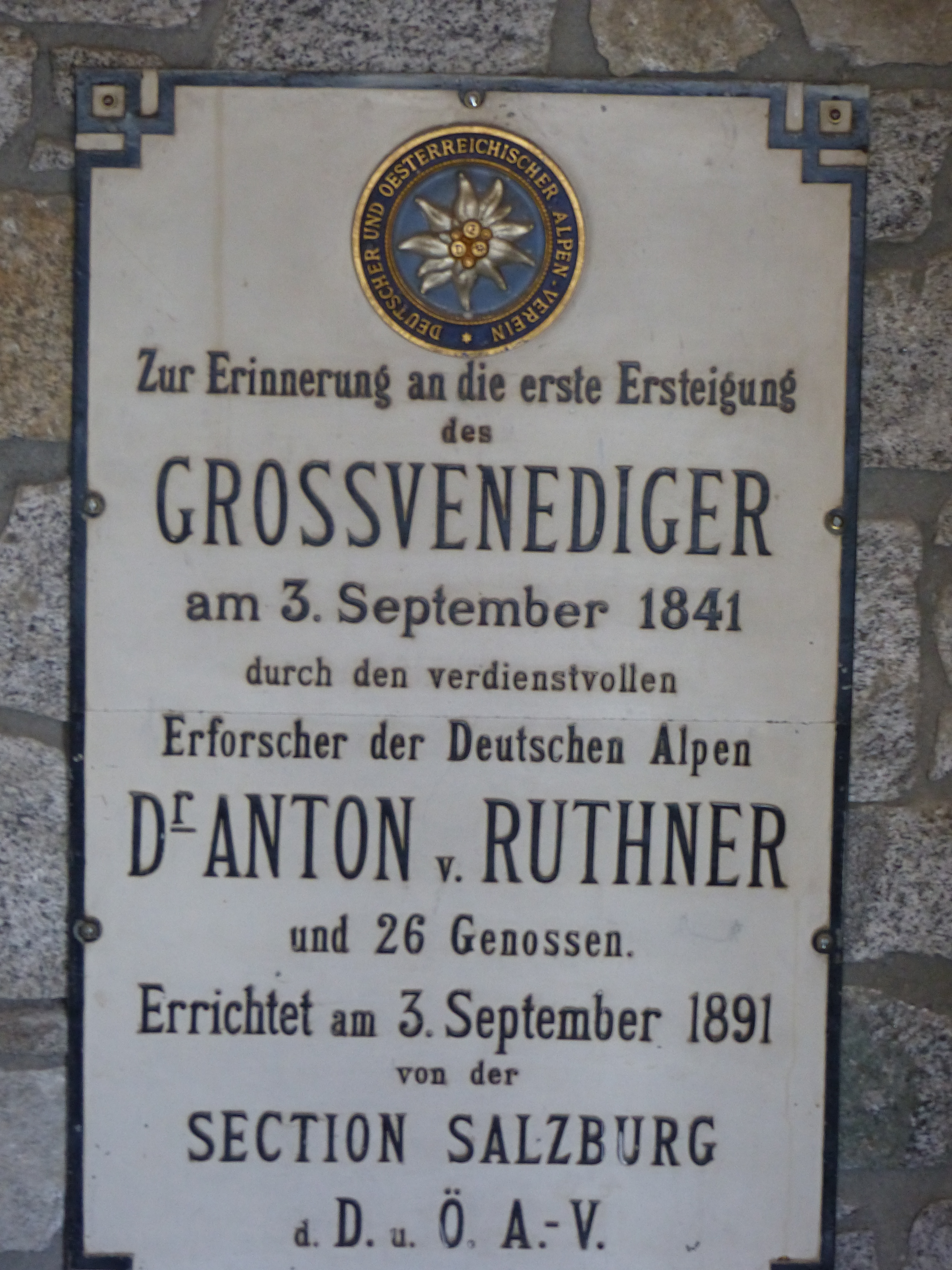 Gedenktafel in der Kürsinger Hütte zur Erinnerung an die Erstbesteigung des Großvenedigers